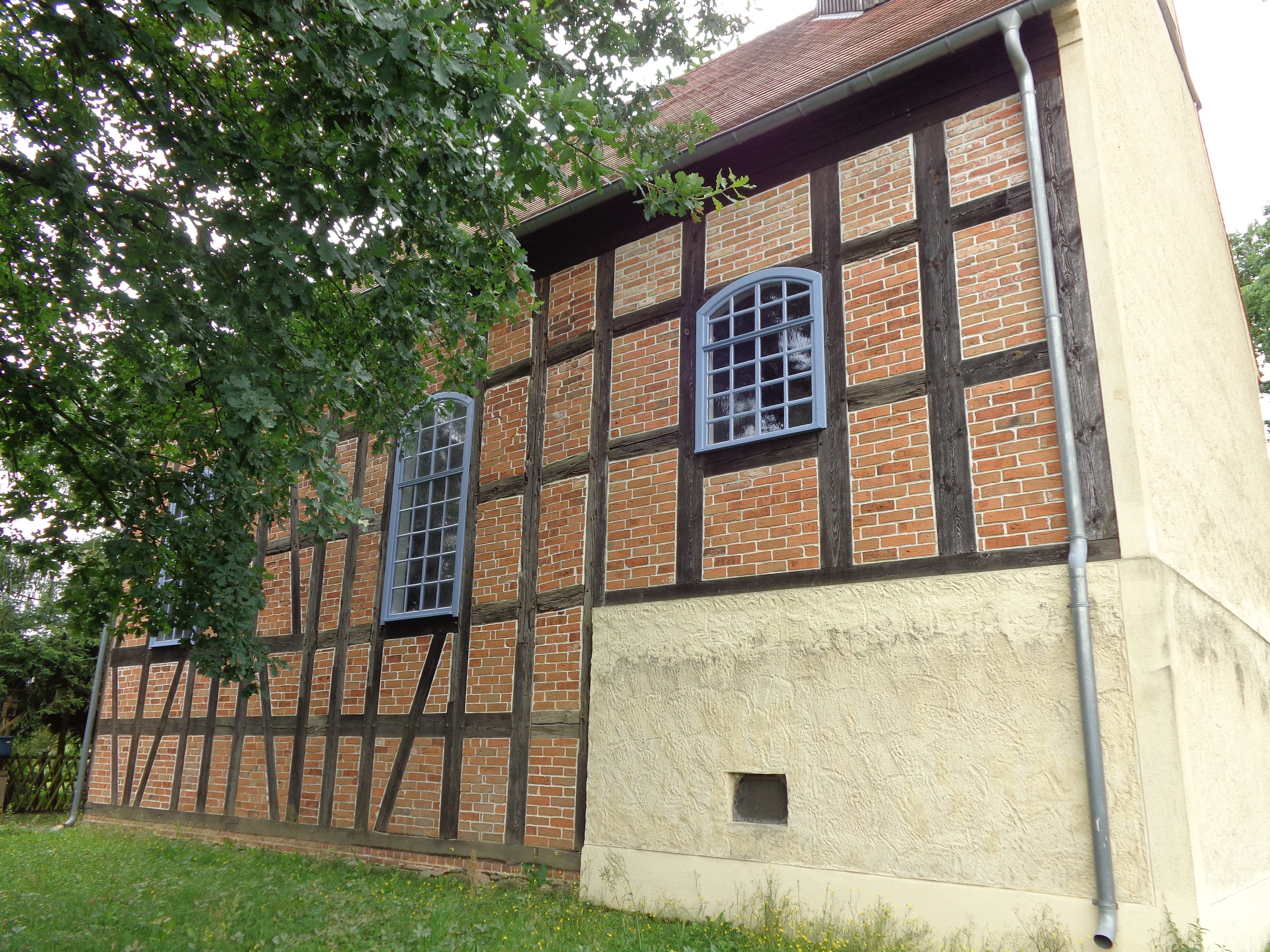 Dorfkirche Illmersdorf, Nordseite, Illmersdorf, Gemeindeteil von Casel, Ortsteil der Stadt Drebkau, Landkreis Spree-Neiße, Brandenburg